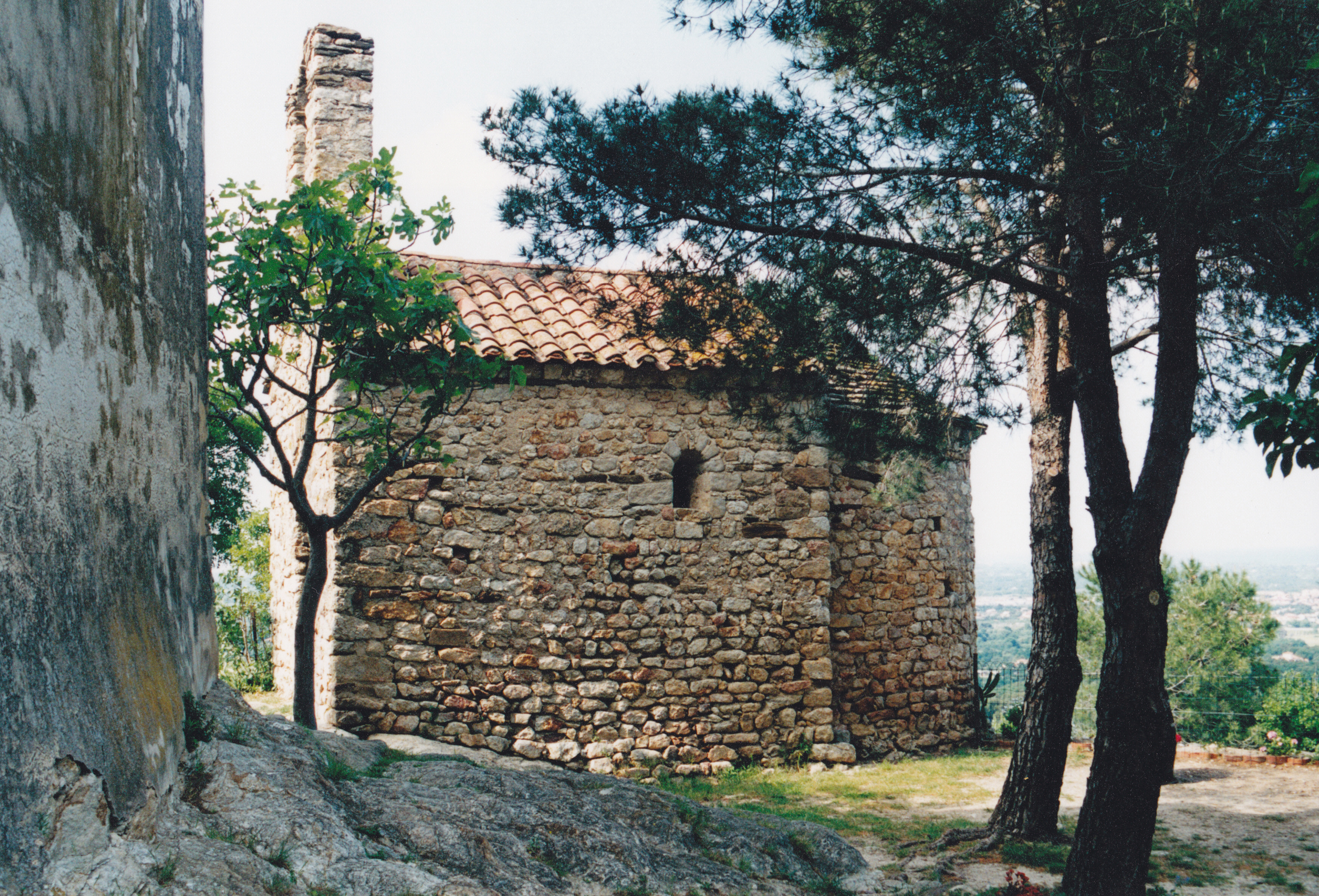 France - Roussillon - Saint-Jérôme d'Argelès (préroman)